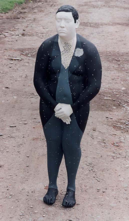 "El novio" (1996)